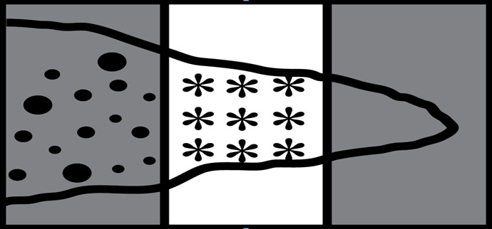 barrera